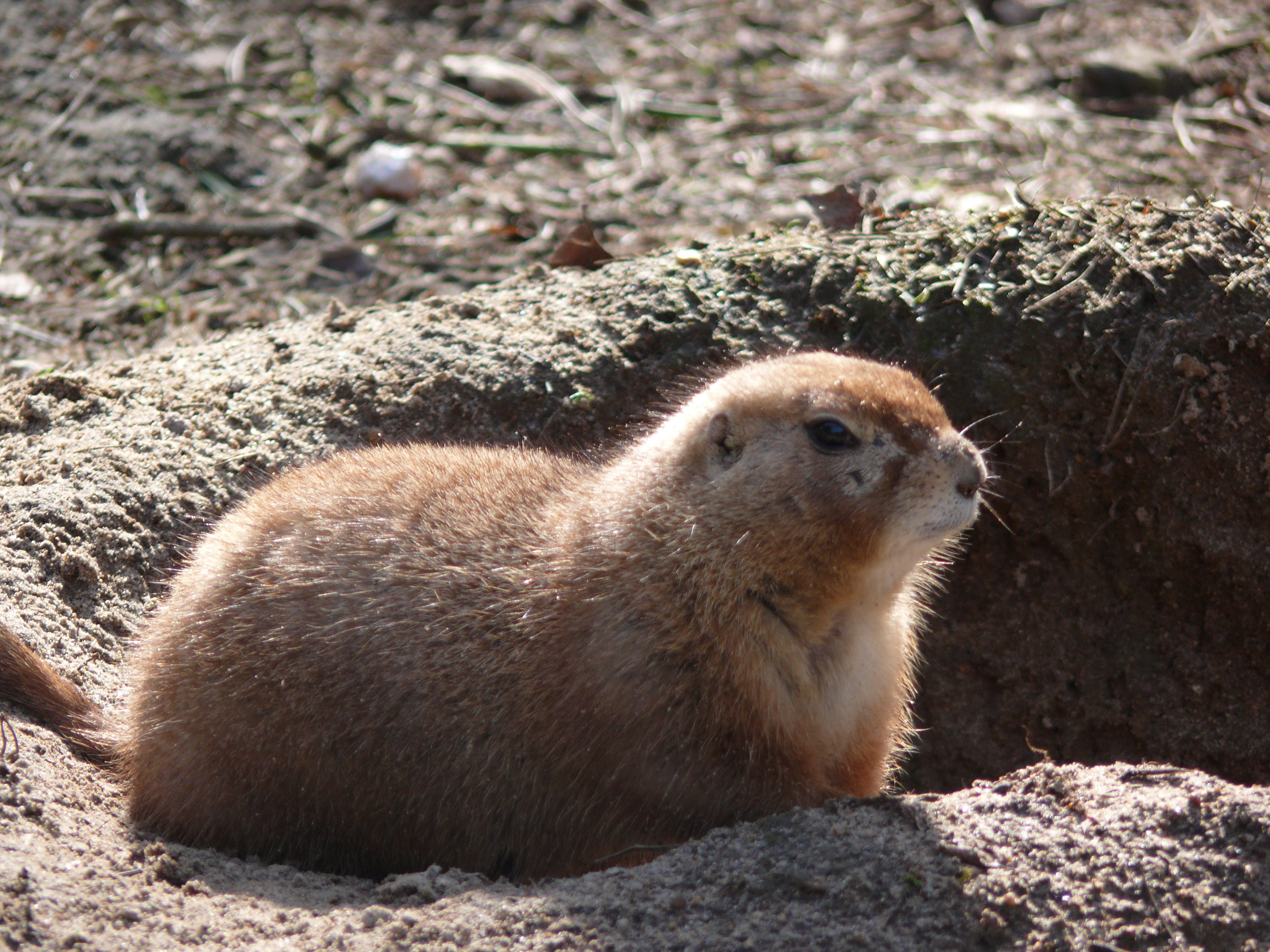 Schwarzschwanz Präriehund (Cynomys ludovicianus)